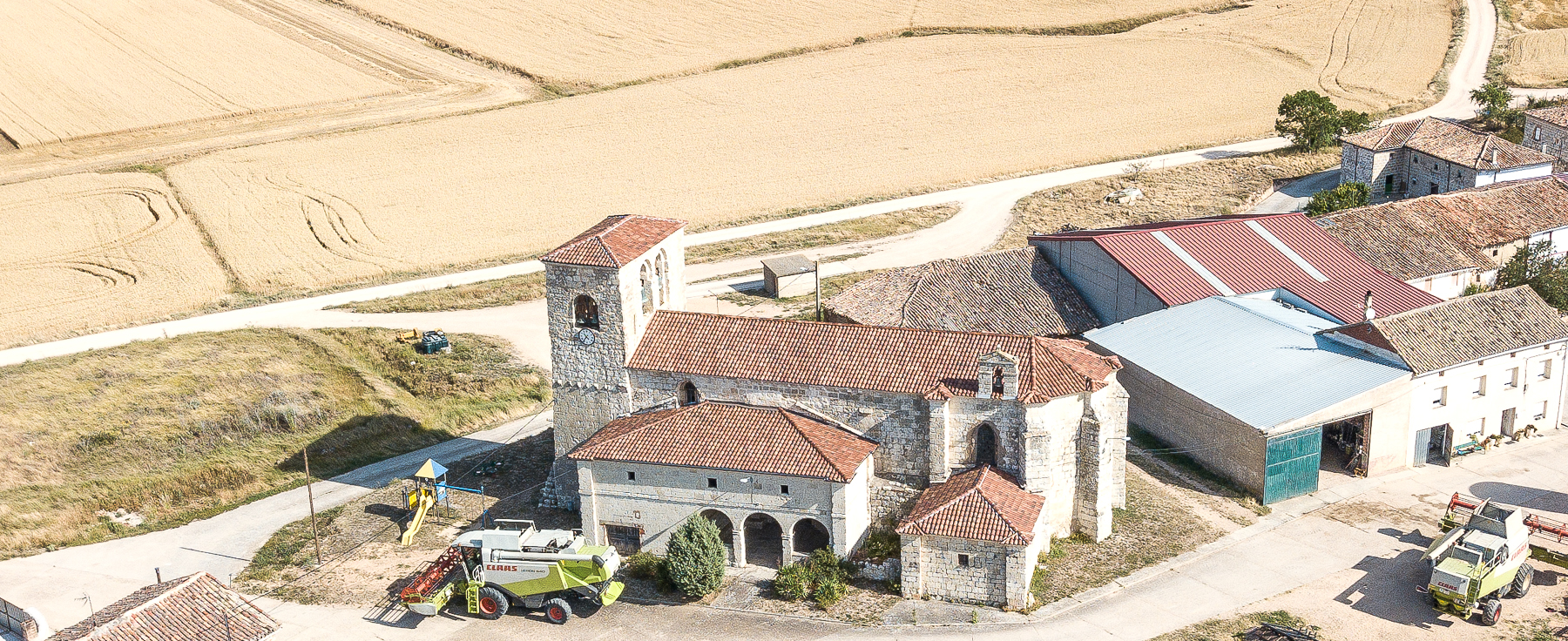 Iglesia de Santa María. Villusto (Burgos). Vista aérea.